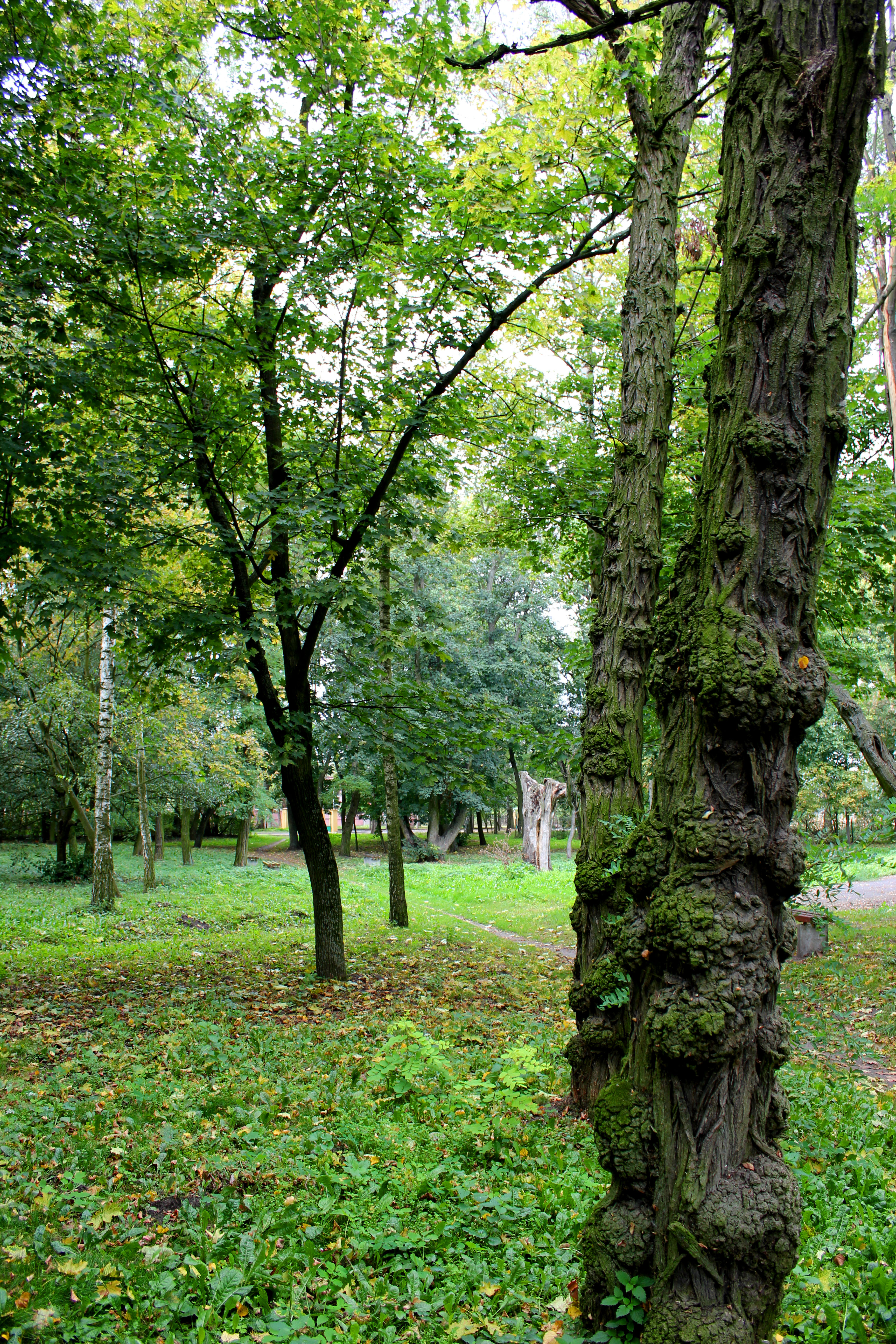 Płowce - zespół dworski: park, XVIII w